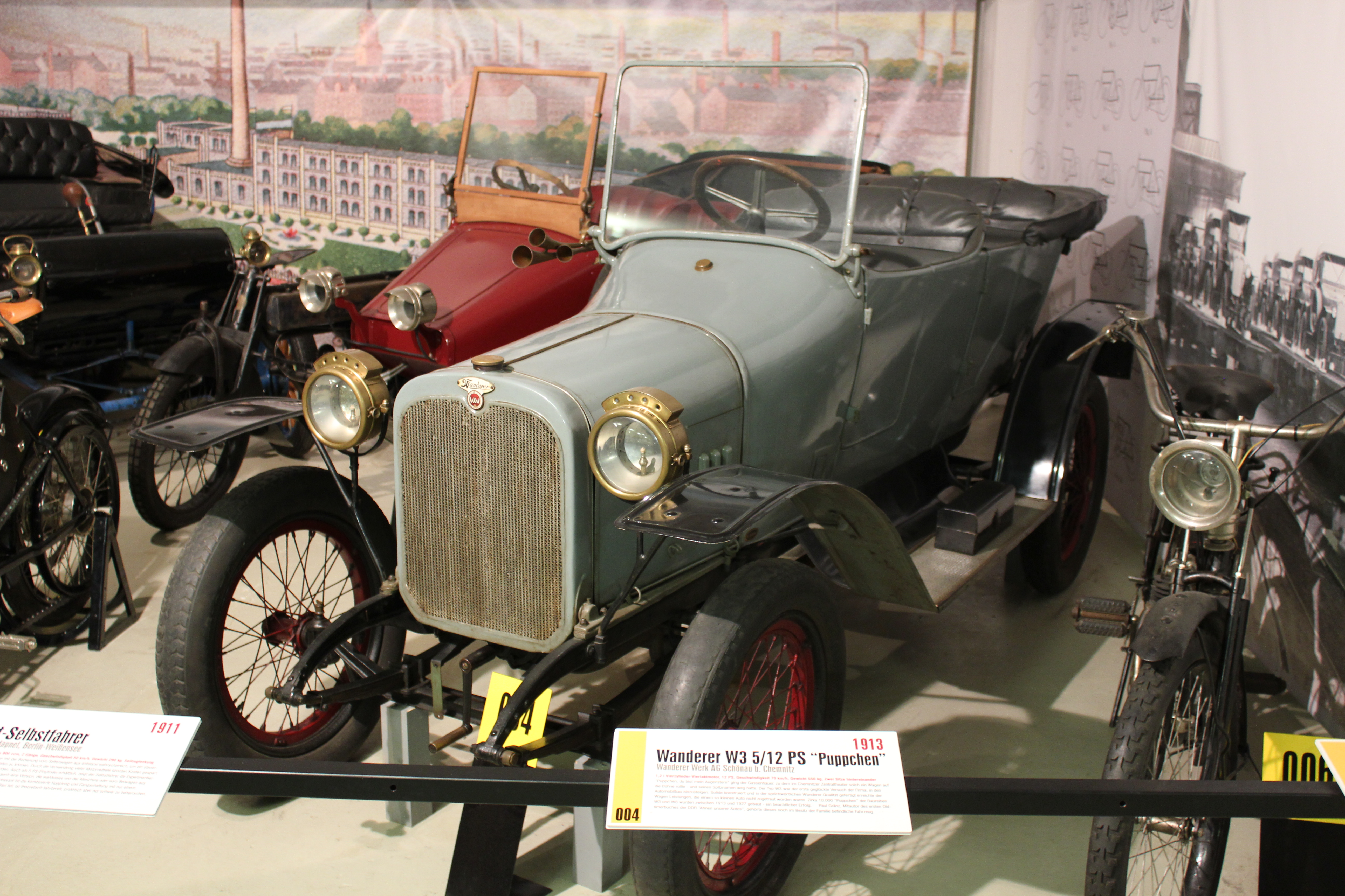 Wanderer W3 Puppchen, Exponat Museum für sächsische Fahrzeuge